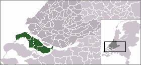 Kaart van Goeree-Overflakkee, gemaakt uit sjabloon van Wikipedia-gebruiker Mtcv